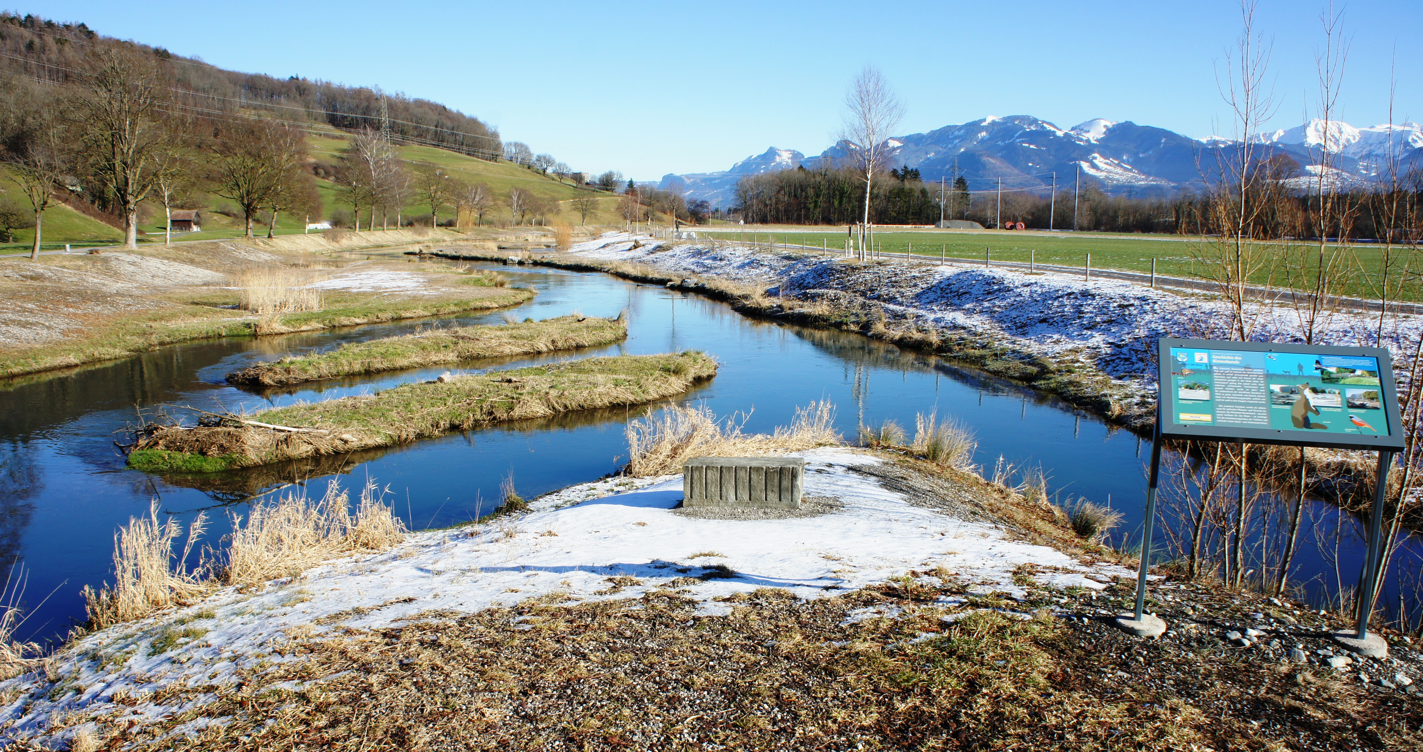 Blick aus Südwesten auf den renaturierten Abschnitt (nordöstlichster Teil) des Rheintaler Binnenkanals unterhalb von Rüthi. Standort; auf einer Insel zwischen zwei Brücken für Fussgänger. Rechts ist eine Info-Tafel über die Geschichte des Binnenkanals zu sehen. Im Hintergrund der Blattenberg (links) und die Vorarlberger Voralpen (Hohe Kugel, Hoher Freschen und Sünser Spitze).